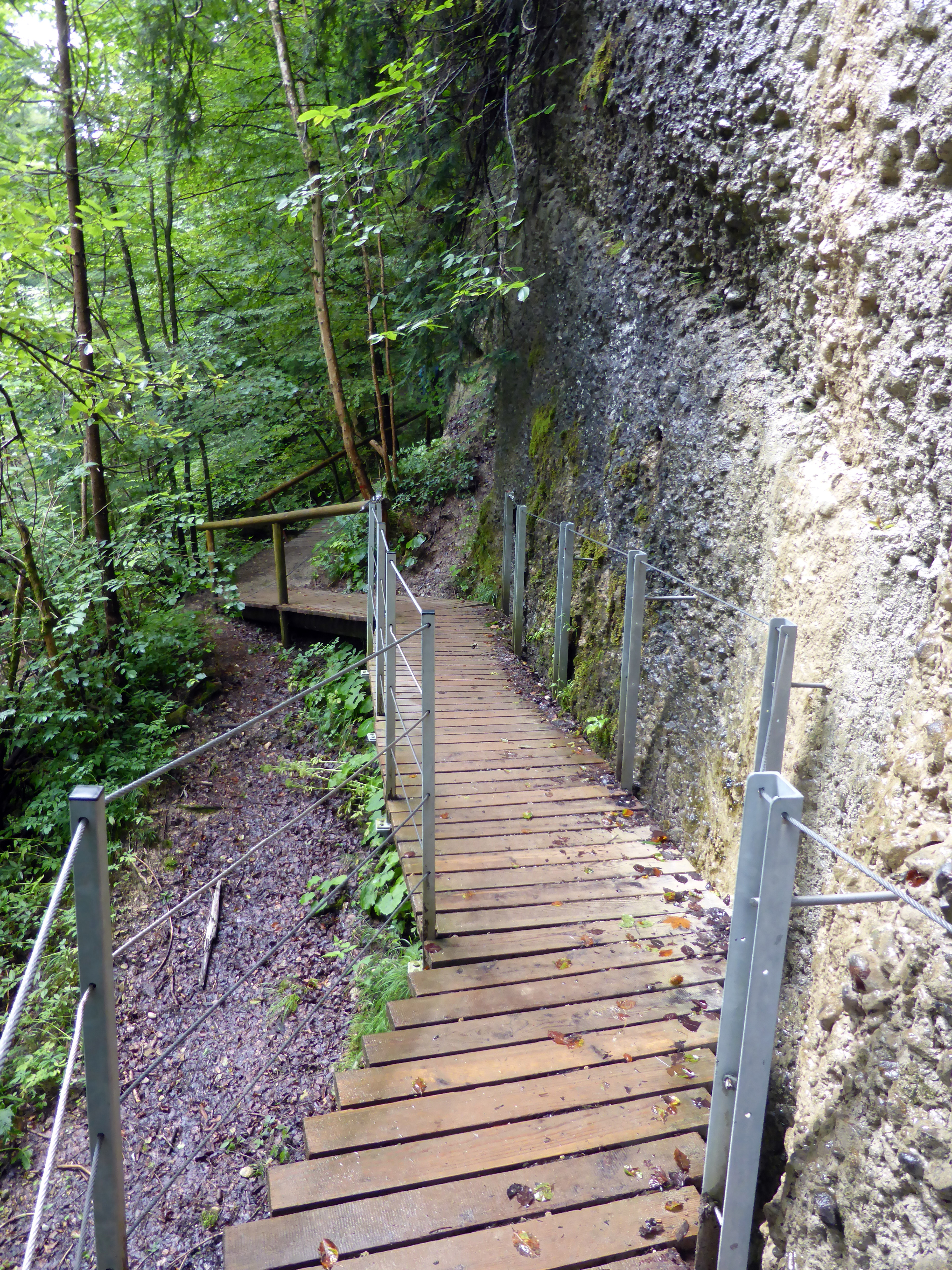 Der Eistobel zwischen der Ortschaft Schüttentobel und der Argentobelbrücke im Westallgäu.